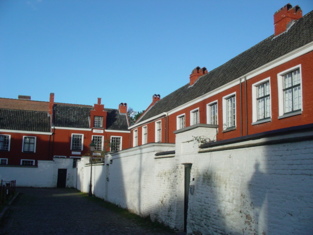 Beguinage Ter Hoyen, Ghent (Belgium)